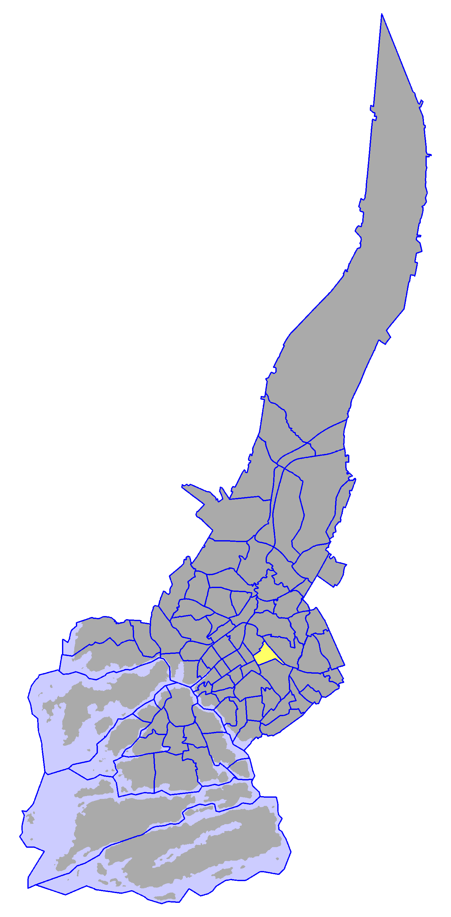 District of Kupittaa, in Turku